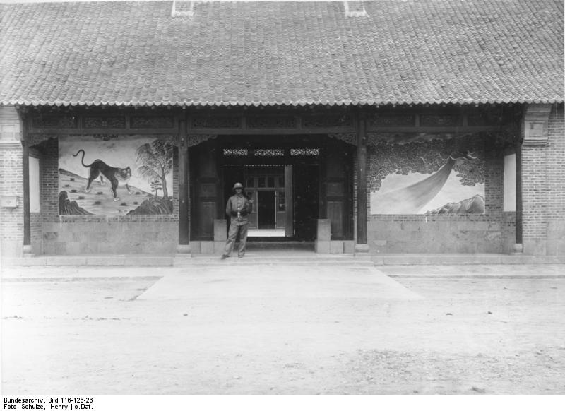 China, Tsingtau Haupteingang zum alten Yamen China.- Tsingtau, Haupteingang zum alten Yamen [lt. Bildtext von Bild 134-B2354(ähnliches Motiv)]